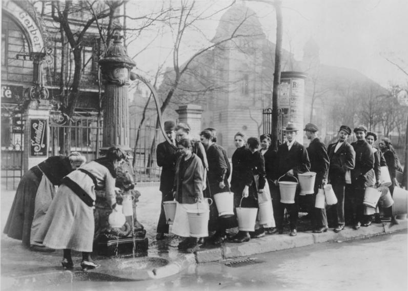 Berlin, Kapp-Putsch, Anstehen nach Wasser ADN-ZB/Archiv Konterrevolutionärer Kapp-Putsch vom 13.-17.3.1920 in Berlin Mit dem Einmarsch der Marinebrigade Ehrhardt am 13. März in Berlin beginnt der Putsch. Als Antwort rufen KPD, USPD, SPD und Gewerkschaften zum Generalstreik auf, an dem sich in ganz Deutschland etwa 12 Mio beteiligen. Die von den Putschisten gebildete Regierung unter Wolfgang Kapp und General von Lüttwitz muß deshalb bereits am 17. März zurücktreten. Berliner holen während des Generalstreiks an einer öffentlichen Pumpe Wasser.